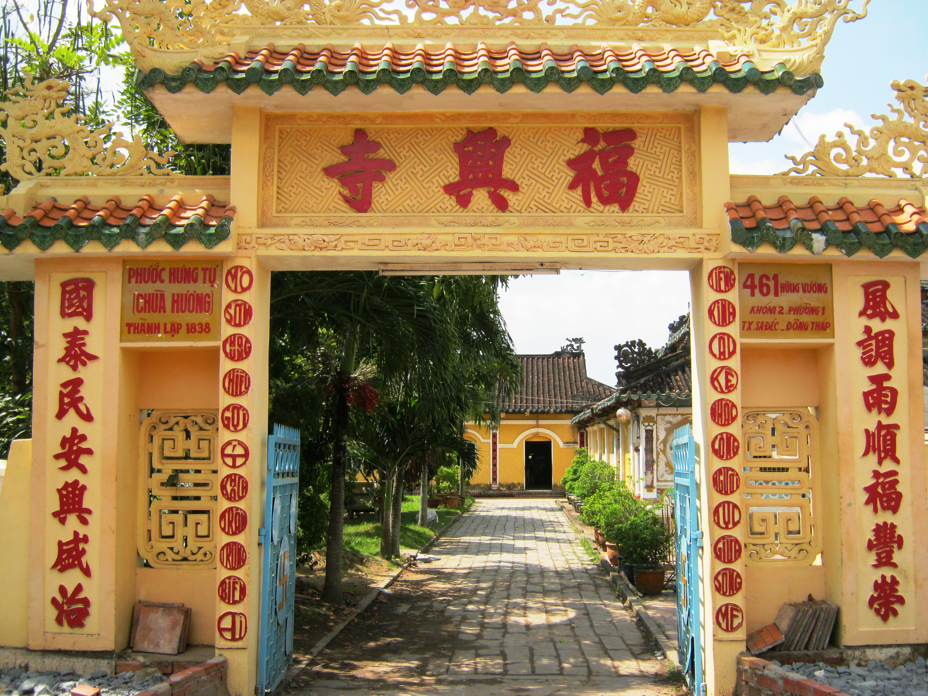 Cổng Phước Hưng Tự (chùa Hương), hiện tọa lạc tại số 74/5 đường Hùng Vương, phường 1, thị xã Sa Đéc, tỉnh Đồng Tháp Việt Nam.